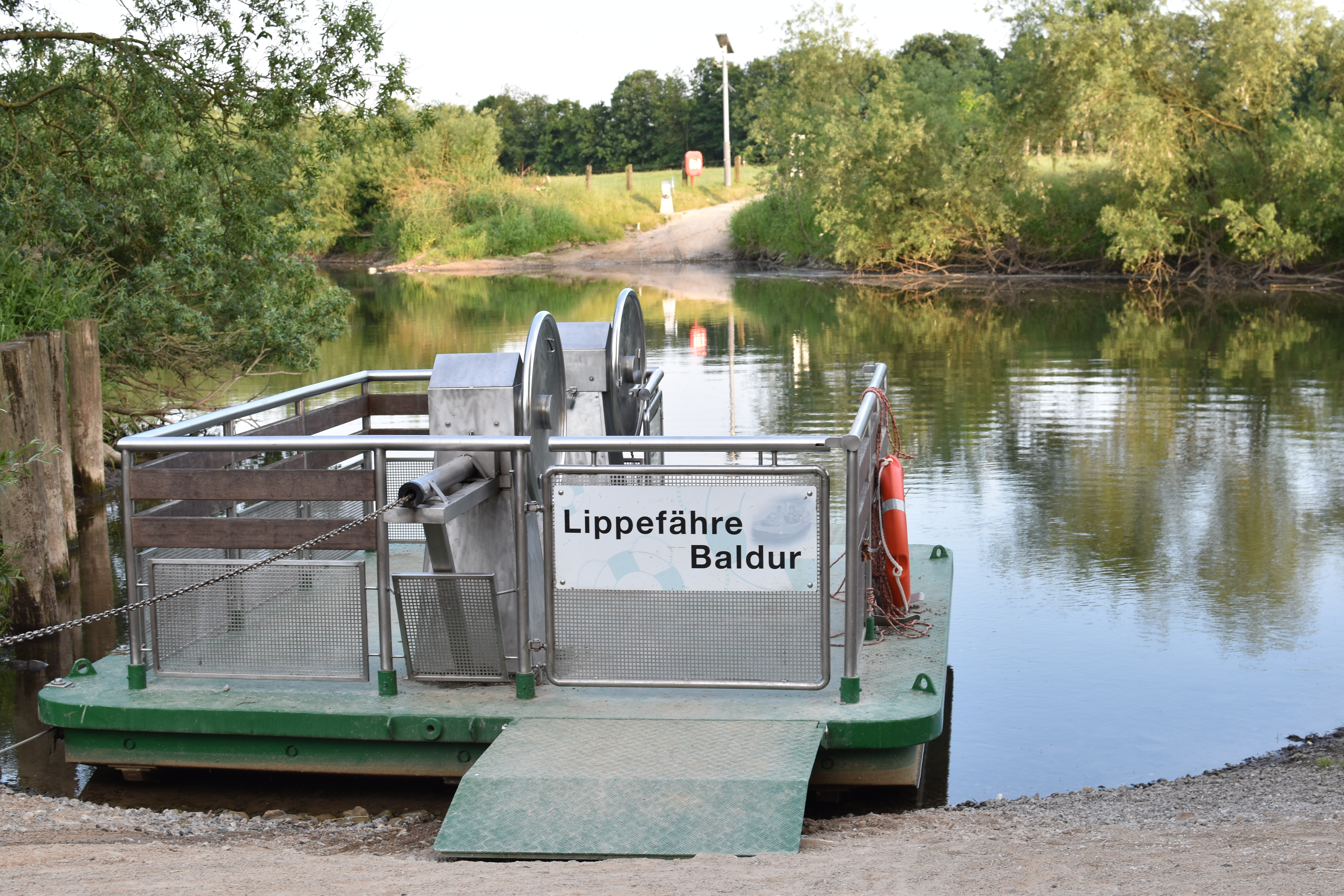 Lippefähre Baldür über den Fluß Lippe in Dorsten Hardt, Walter-Schulte-Weg, Nordrhein-Westfalen. Eine thematische Wegschleife der Römer-Lippe-Route führt hierher